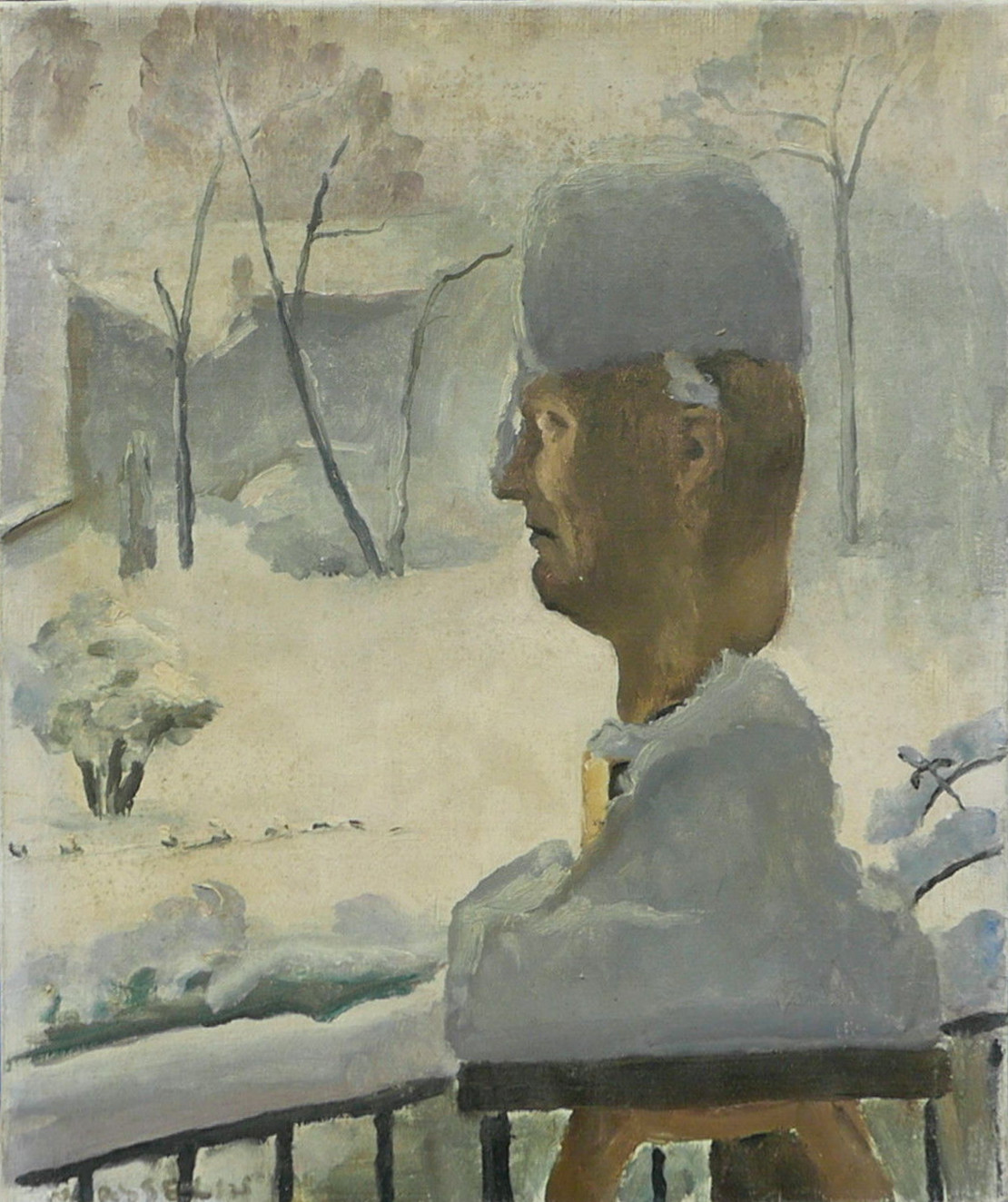 Autoportrait sous la neige à Neuilly